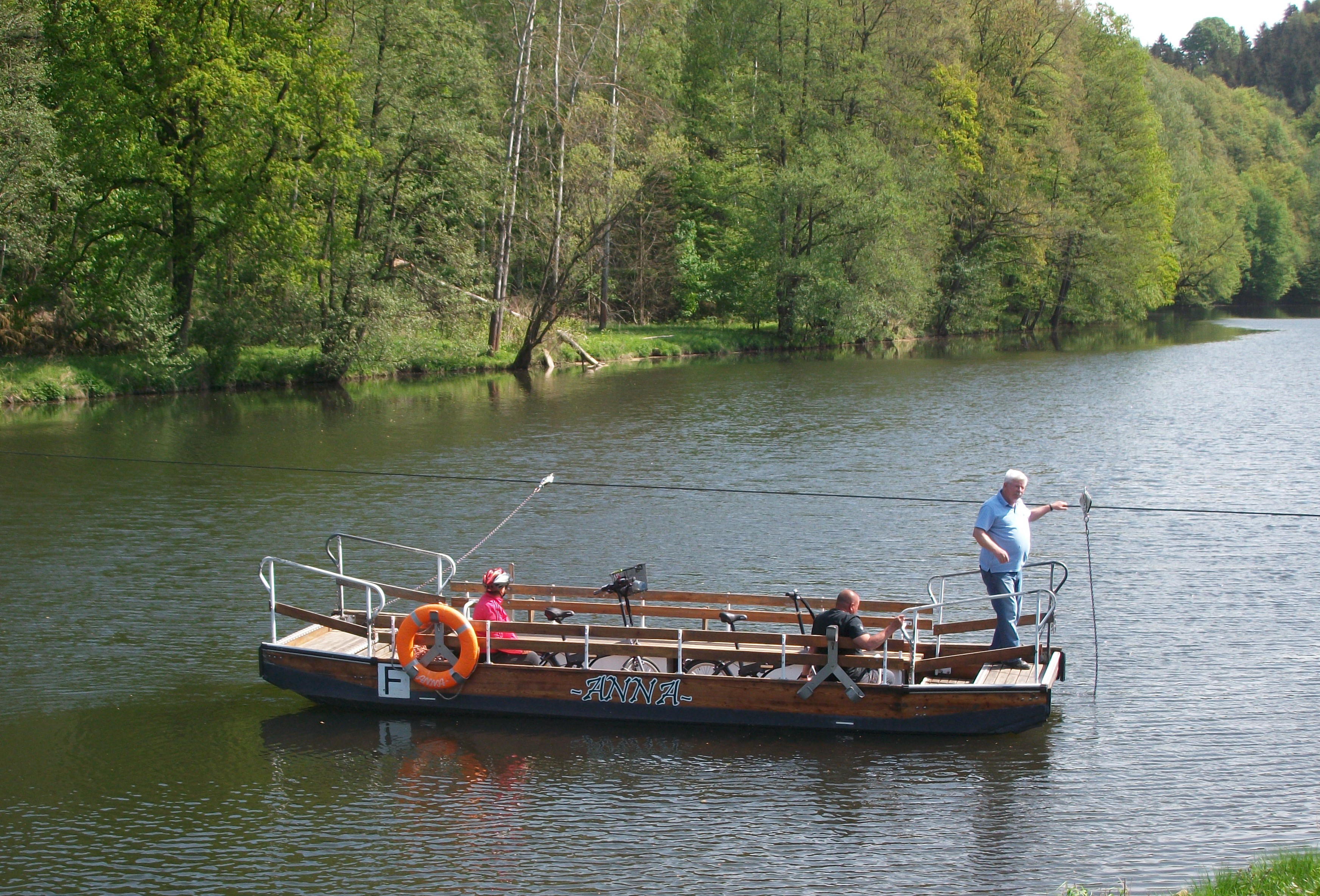 Krumbach, Fähre "Anna" über die Zschopau